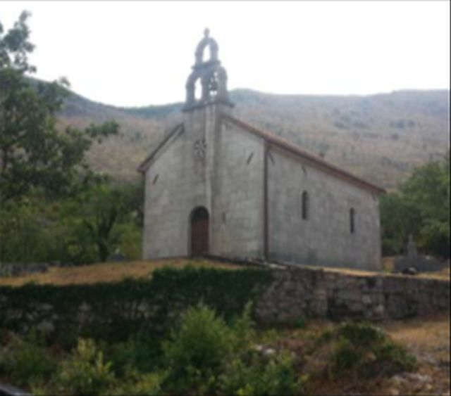 Hram Svetog proroka Ilije